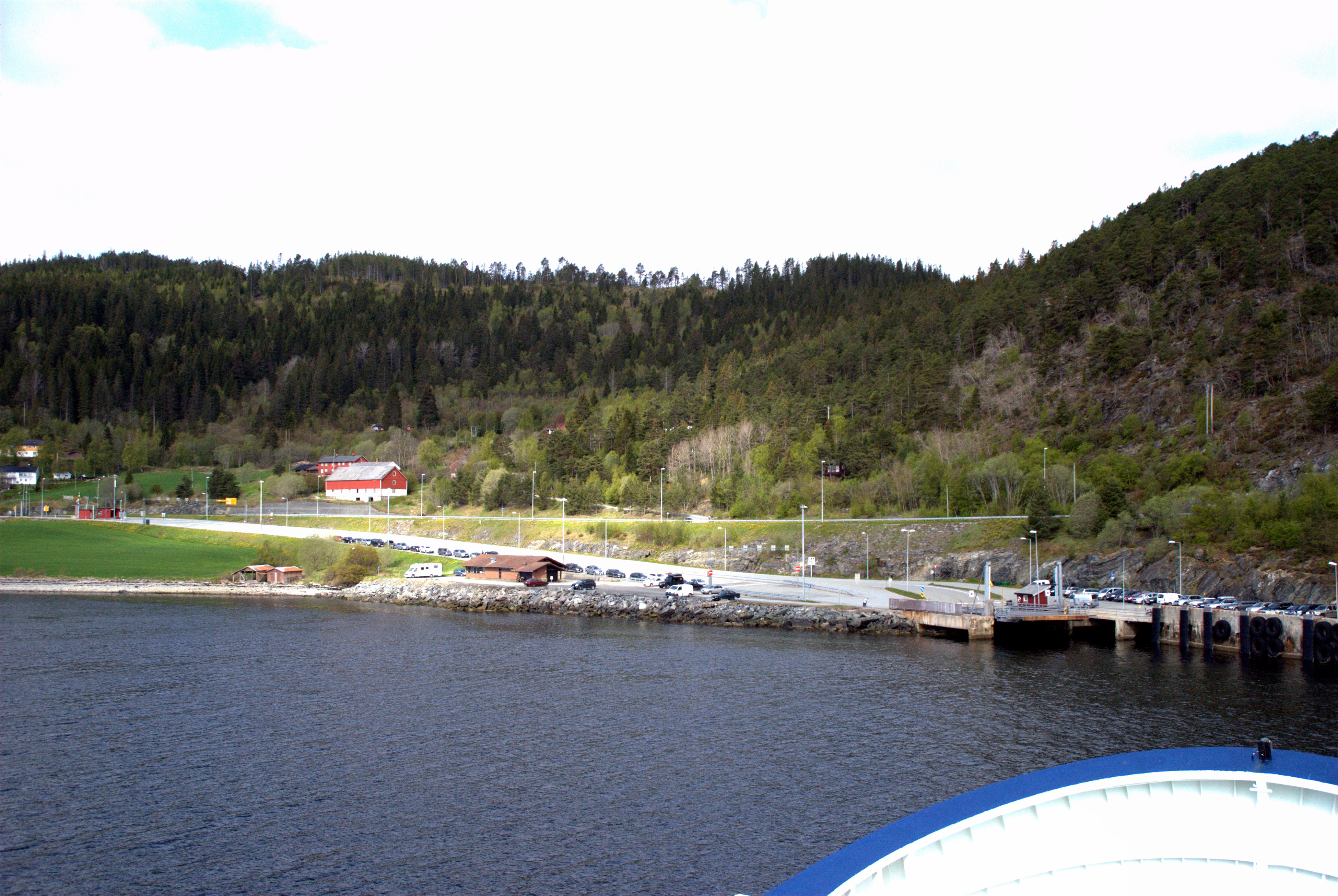 Rørvik fergeleie på Fergesambandet Flakk–Rørvik (Fylkesvei 715) ved Rissa i Sør-Trøndelag.